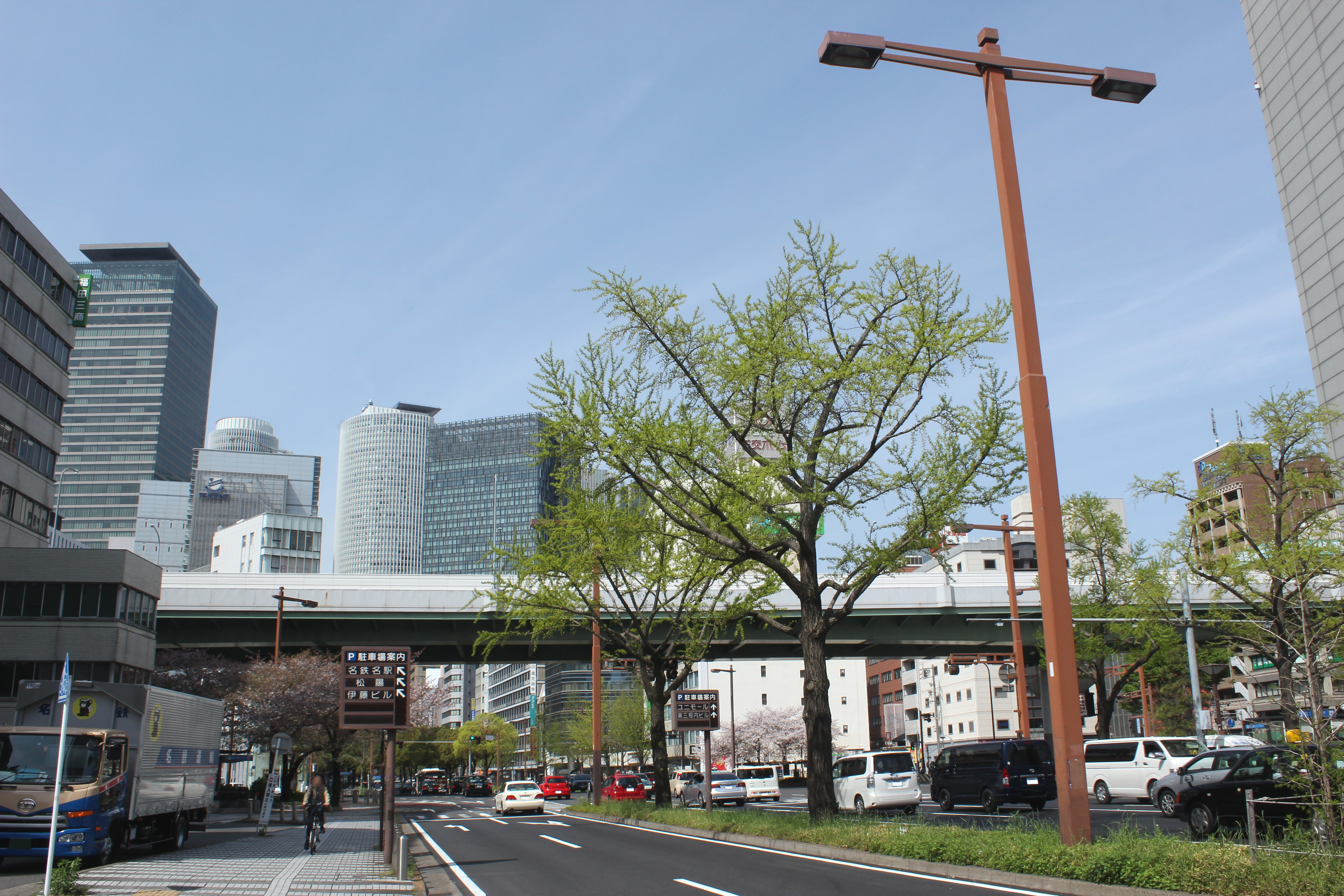 名古屋高速都心環状線 桜通にて名古屋駅方向を望む